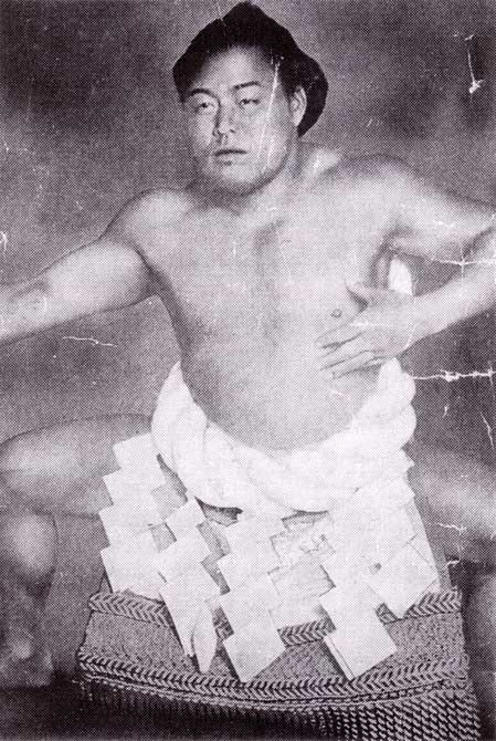 the 27th Yokozuna Tochigiyama Moriya （第27代横綱 栃木山守也）